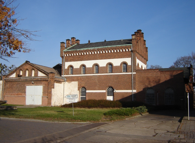 Ehemaliges Wasserwerk in Magdeburg-Buckau